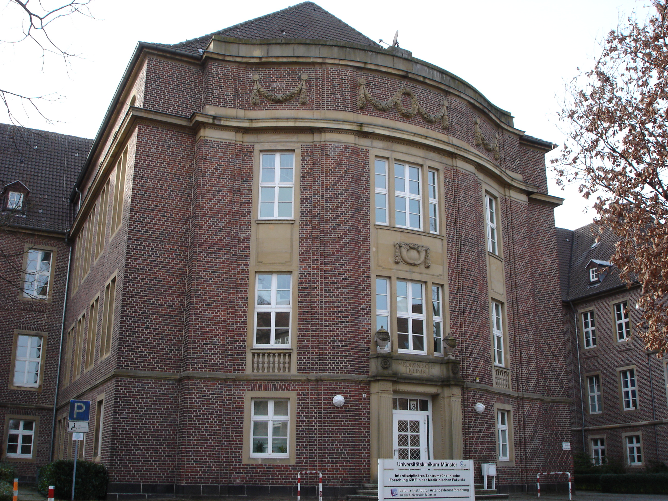 Leibnitz-Institut für Arterioskleroseforschung, Domagkstraße 3, Münster, Germany